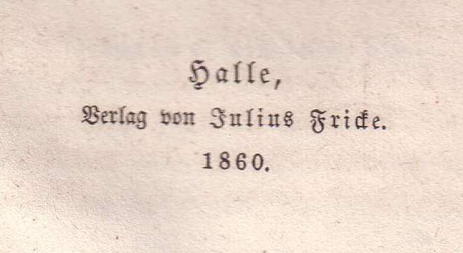 Firma Imprint Julius Fricke